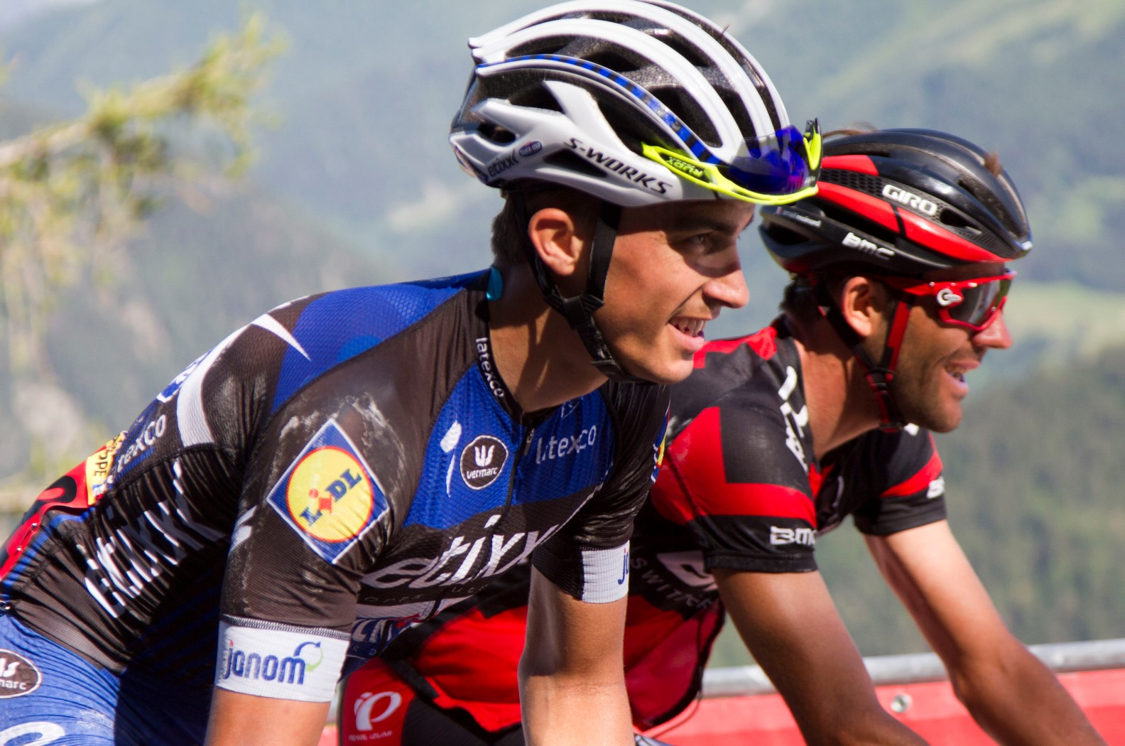 307 alaphilippe